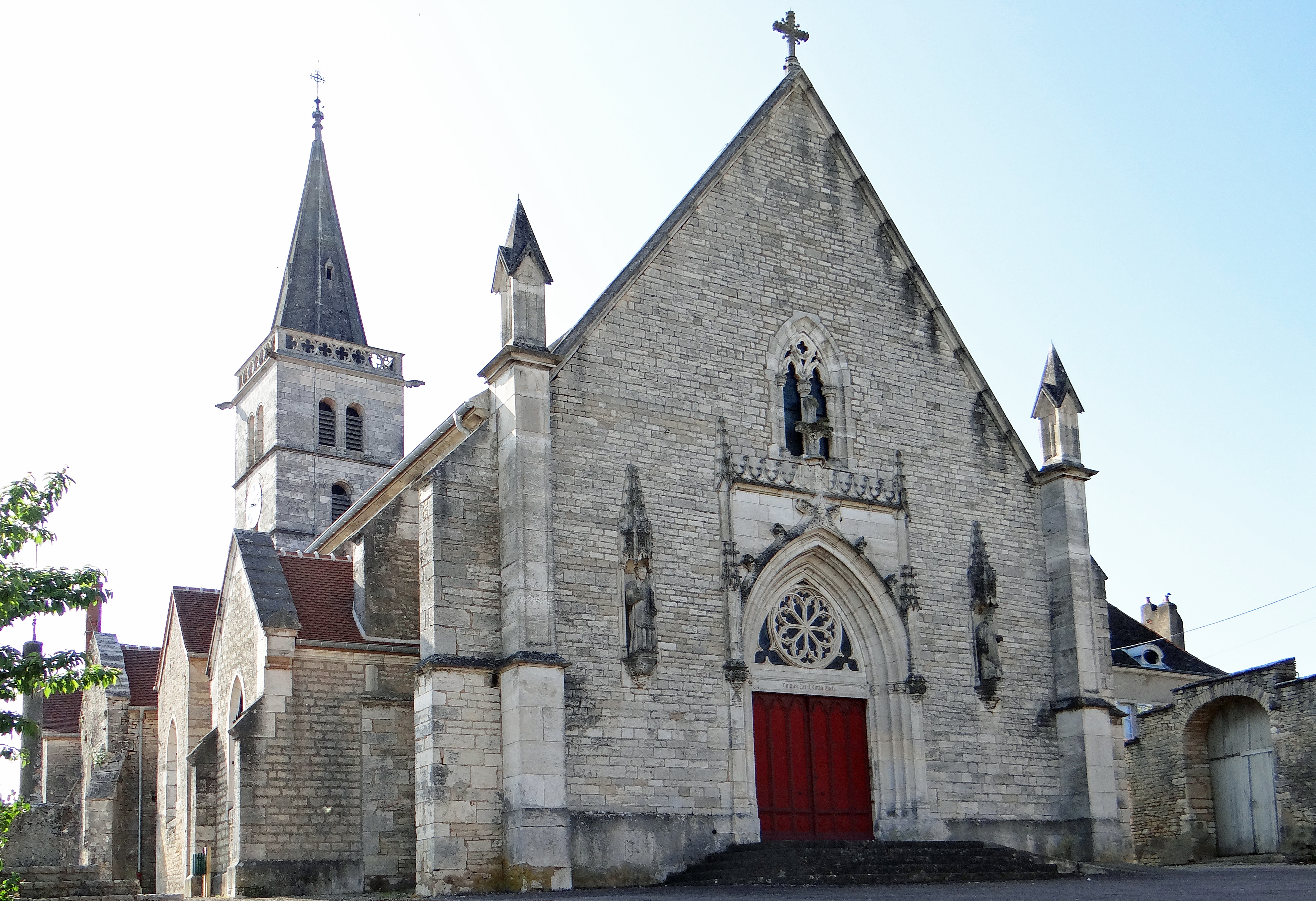 Rully - Église Saint-Laurent - Façade principale